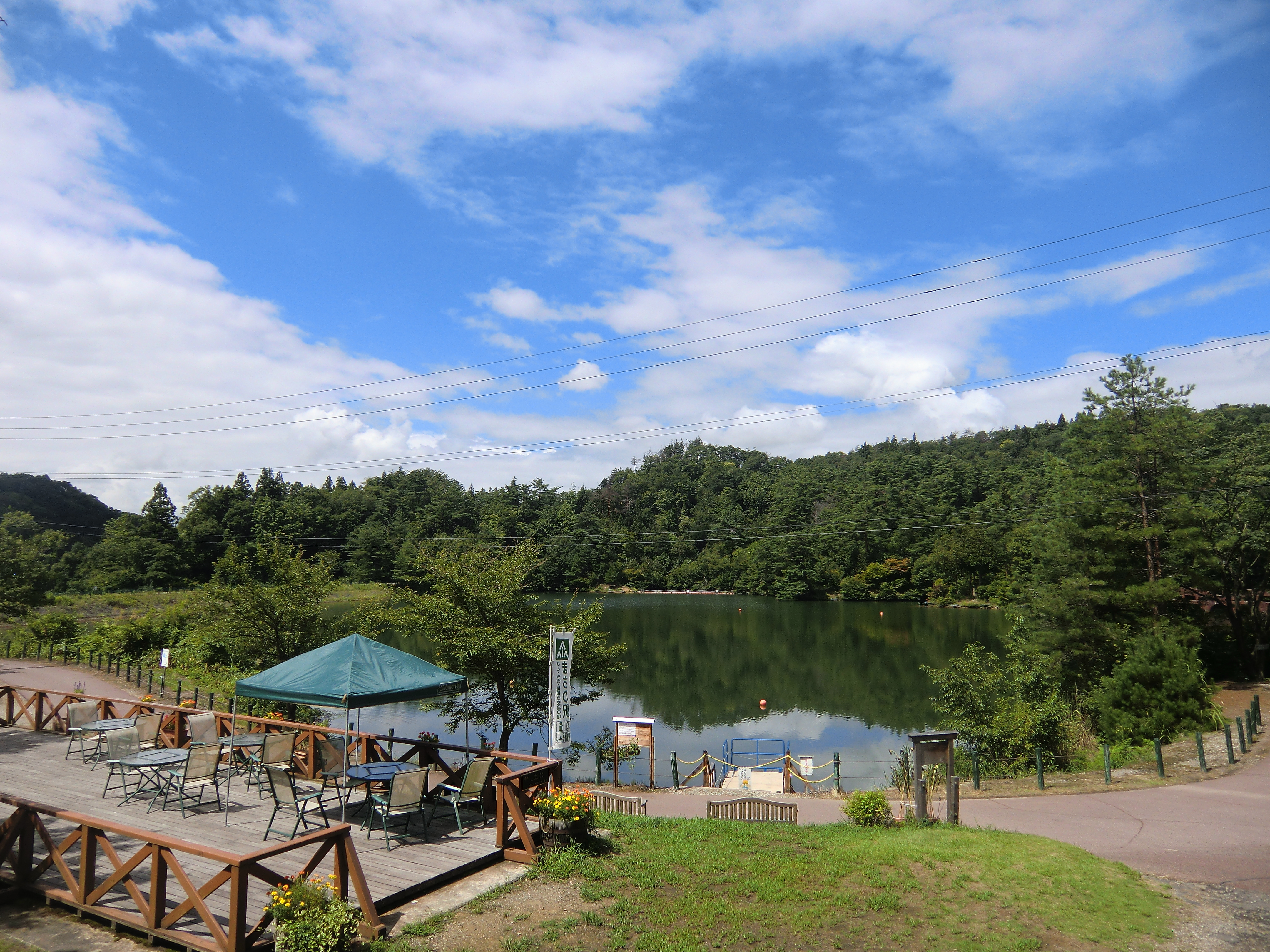 ログハウスから撮影した大平堤とテラスです。